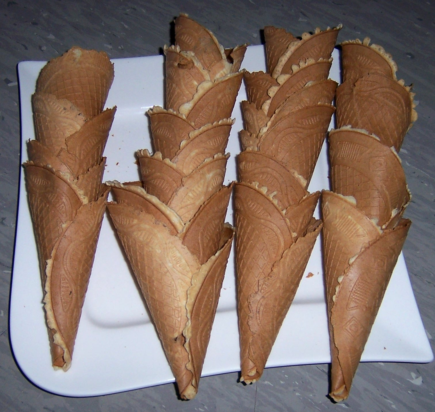 Neujahrskuchen